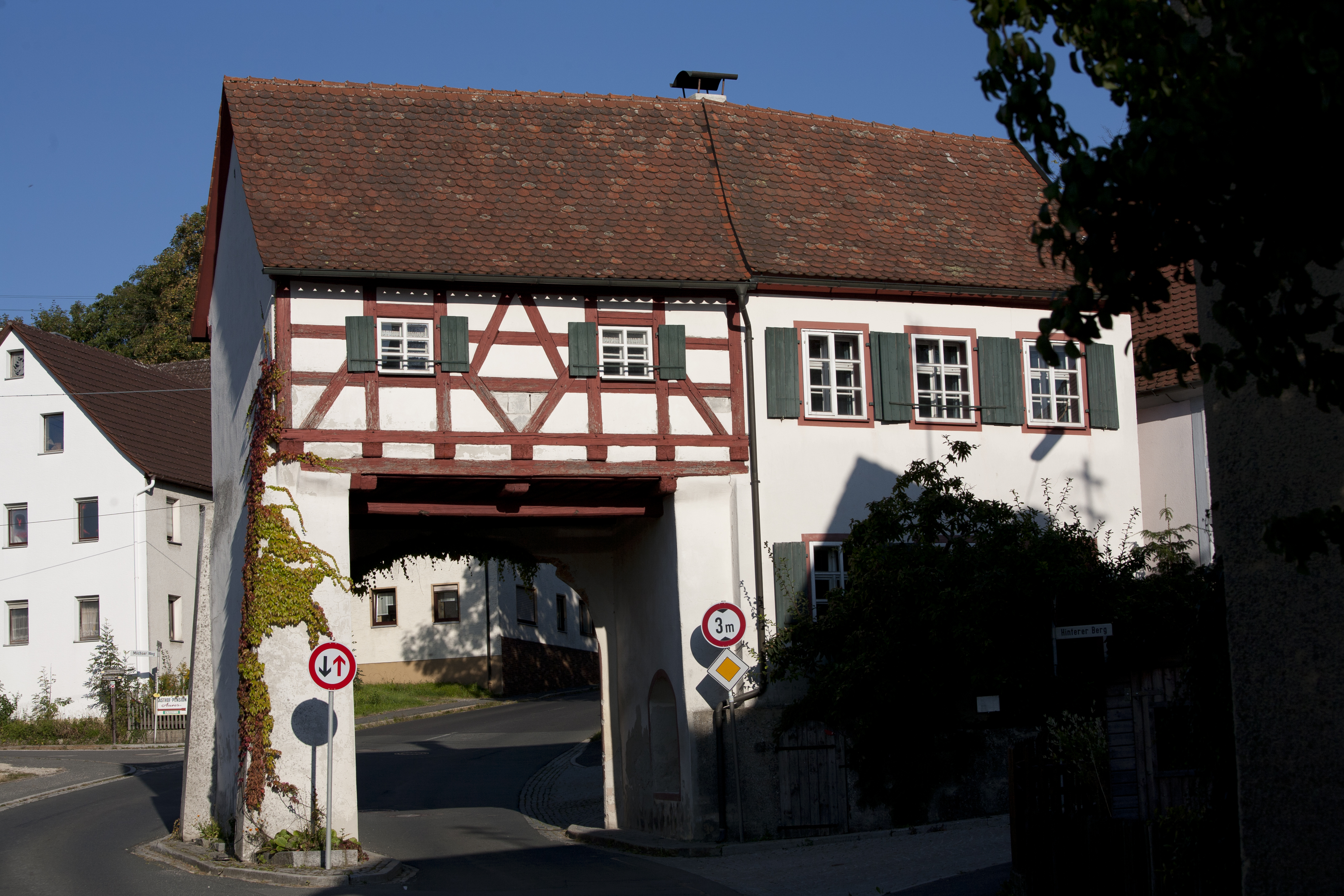 Hiltpoltstein: Nördliches Stadttor. Torhaus über die Bundesstraße 2 mit kleinem Heimatmuseum.